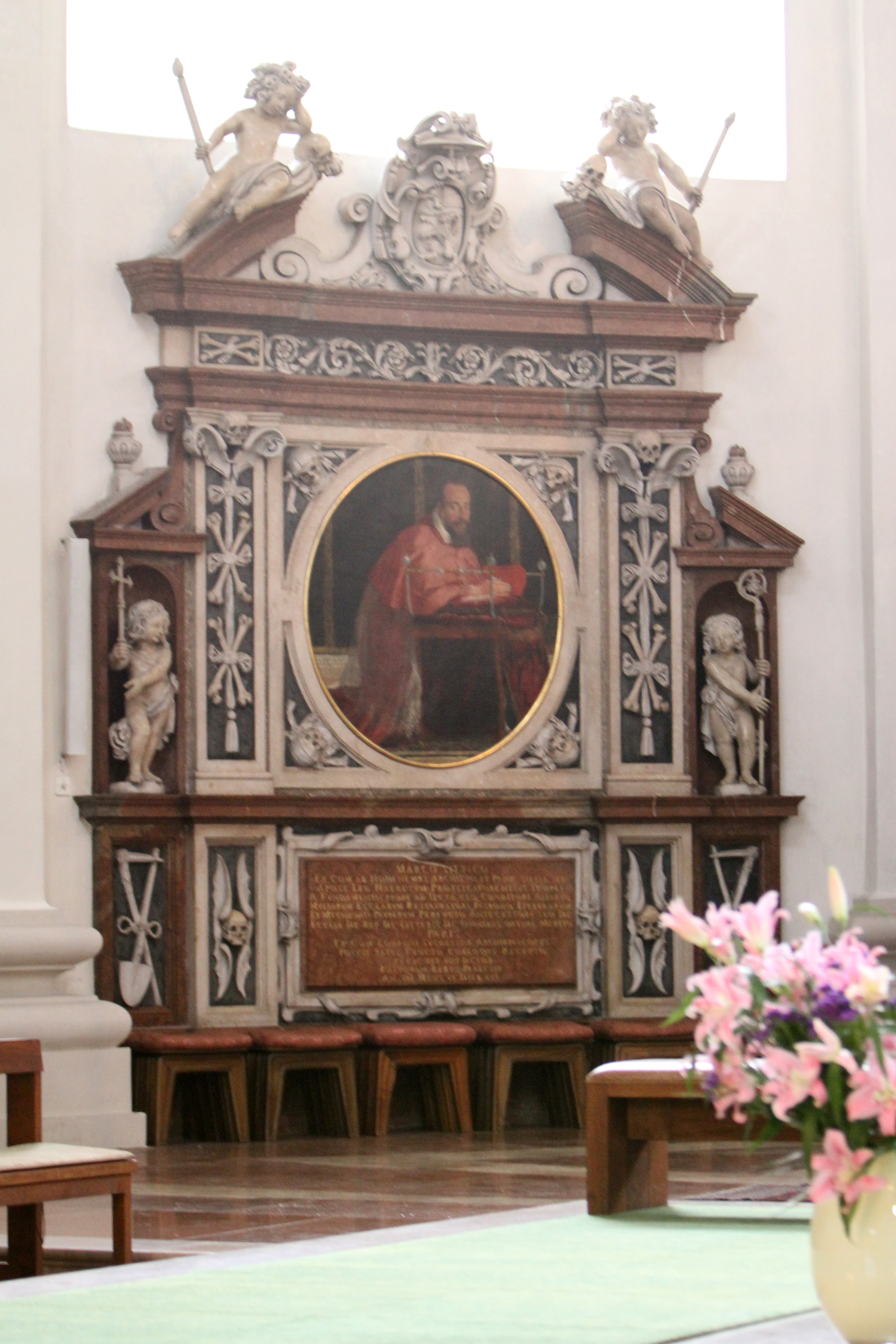 Salzburg Cathedral - cenotaph of Archbishop Marcus Sitticus of Hohenems